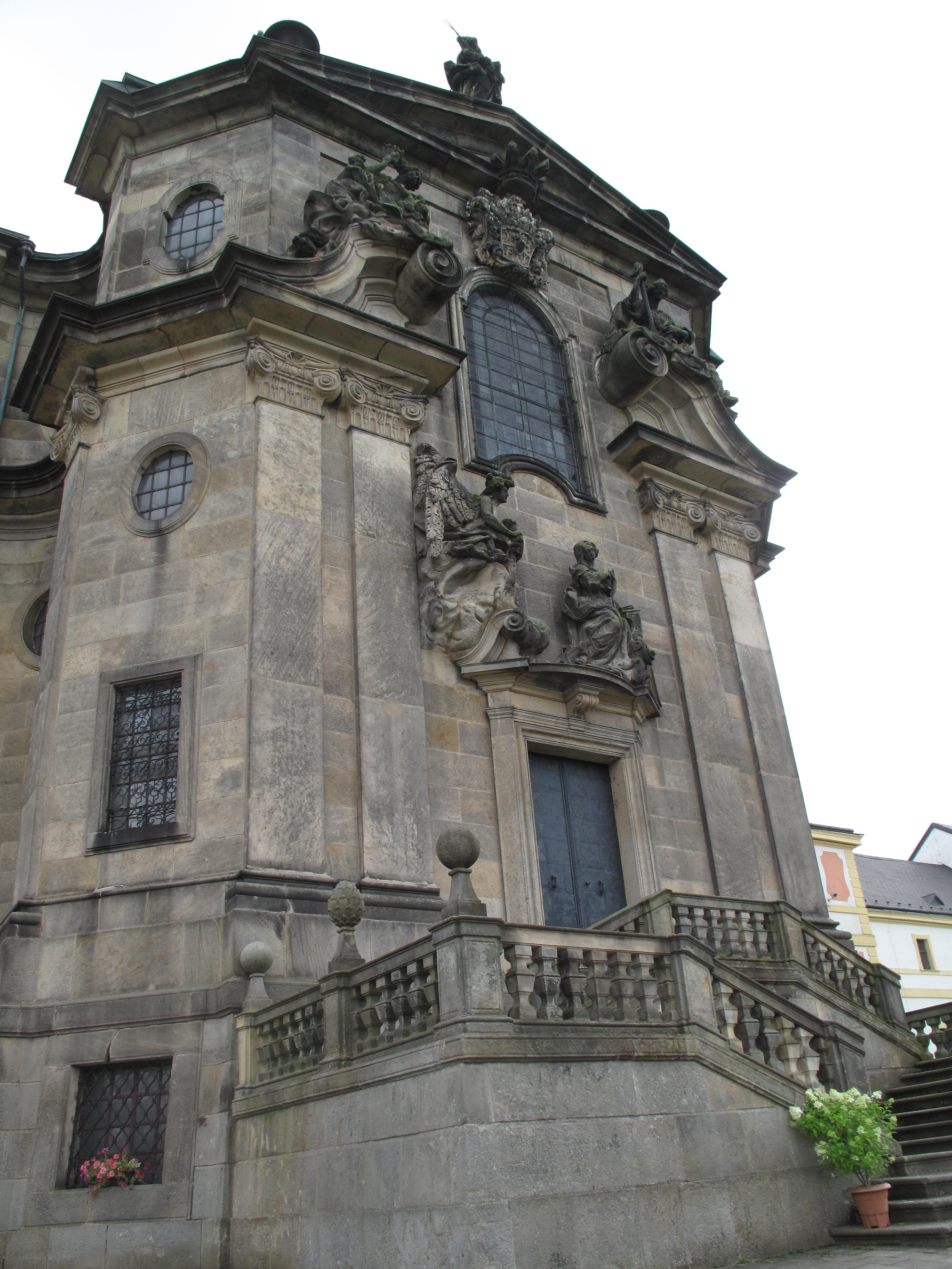 Hospital Kuks